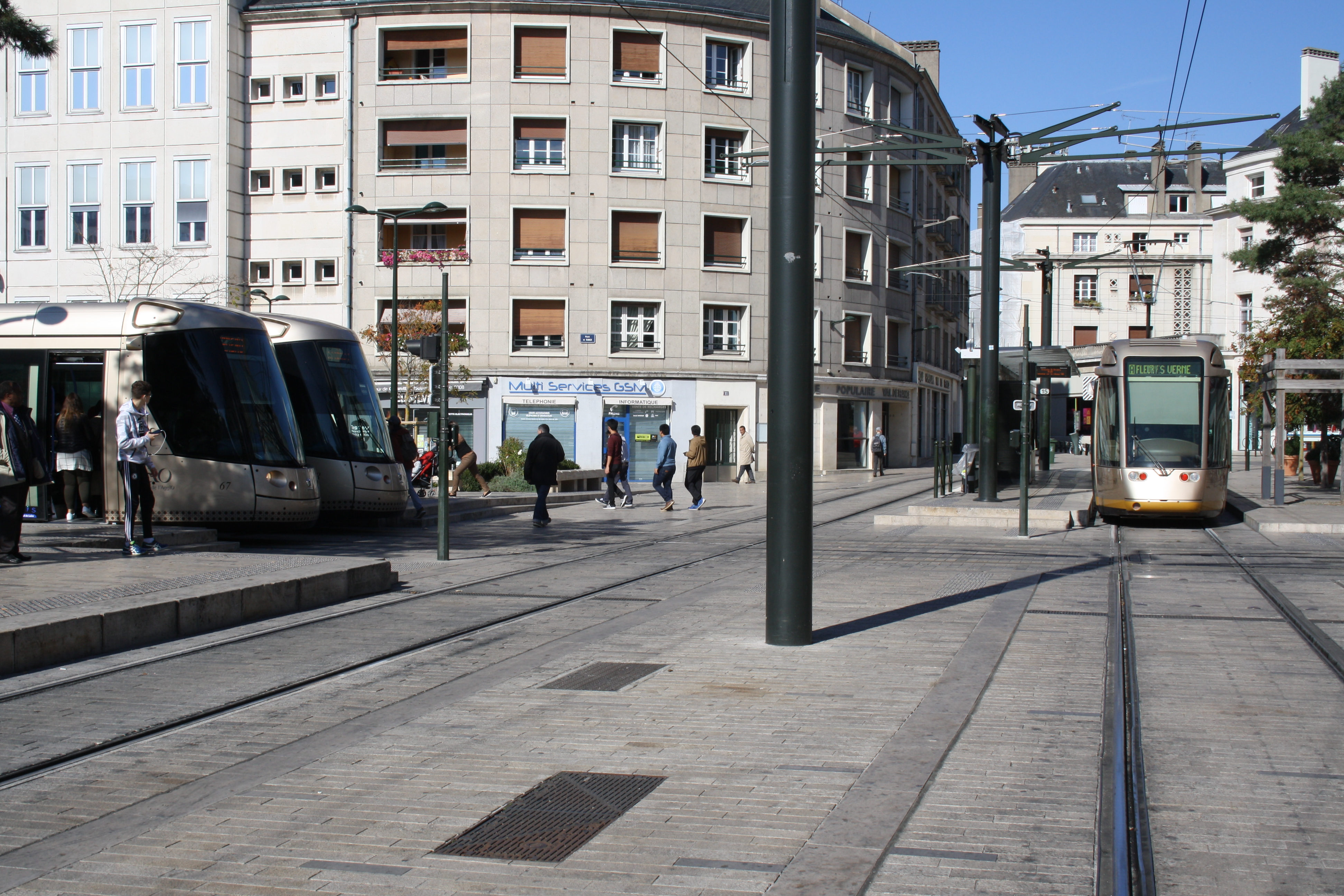 Orléans, place du Général de Gaulle